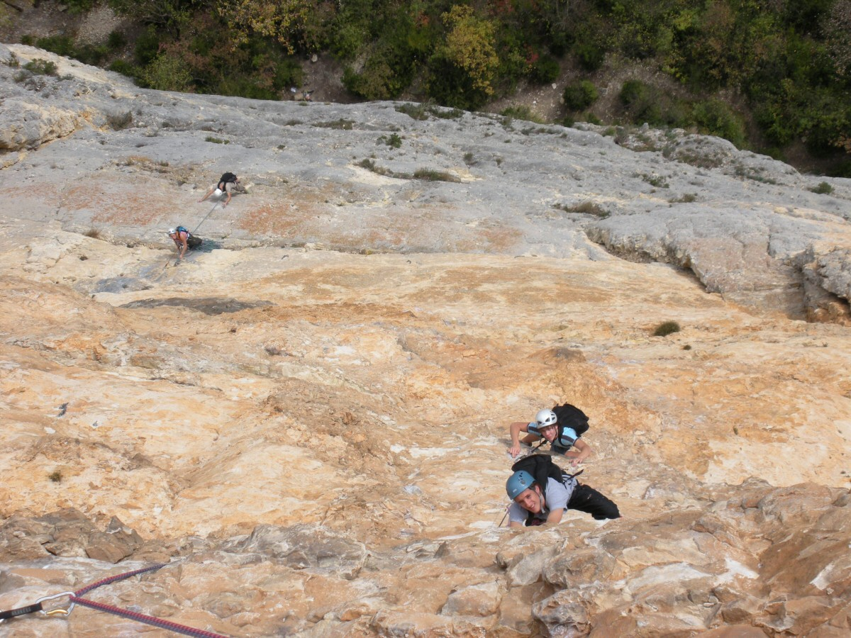 2ème longueur